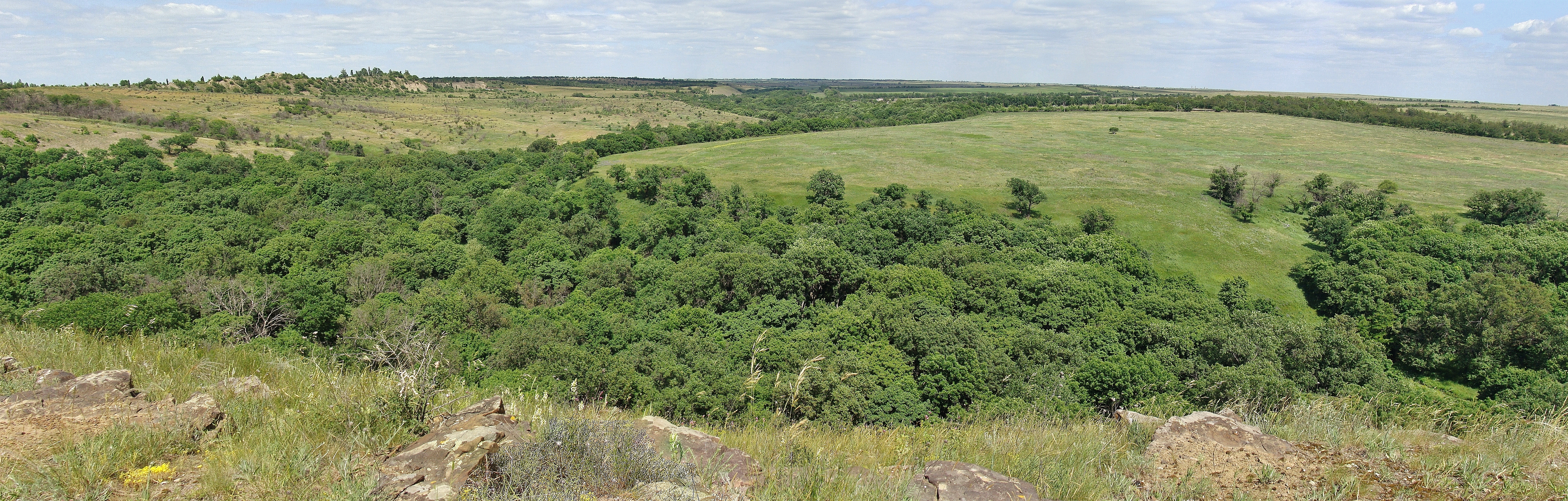 Певчея балка.